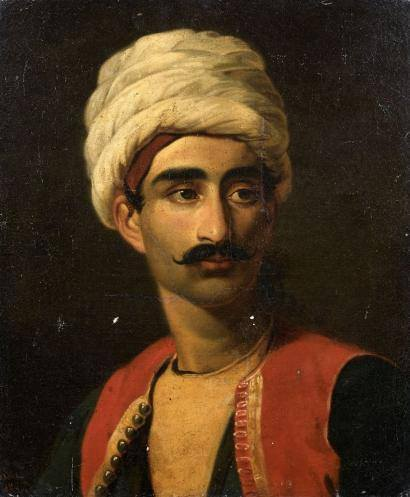 Portrait présumé d'Hassan, gardien de la girafe offerte à Charles X par Méhémet Ali.